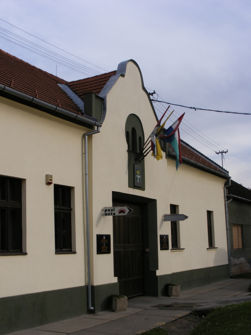 Sjedište općine Erdut u Dalju